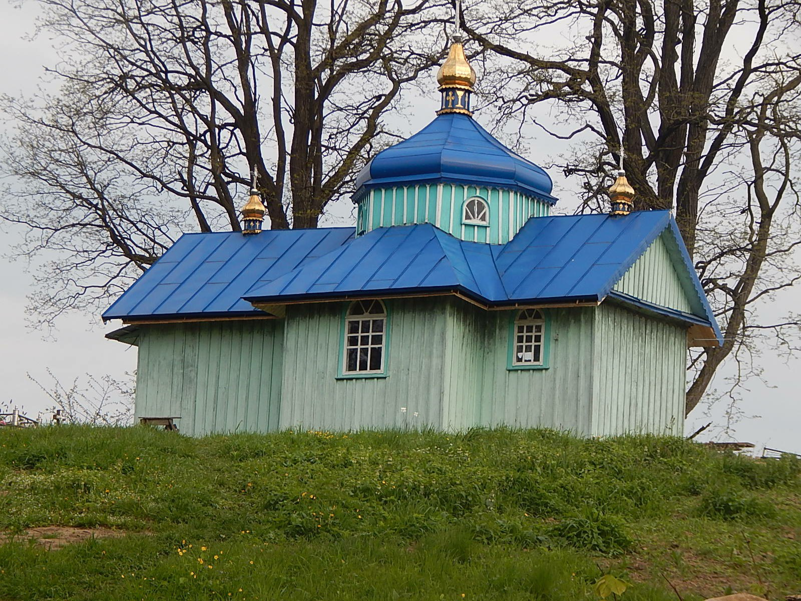 Церква-каплиця Собору Пресвятої Богородиці збудована у 1928 р. на цвинтарі с. Новиця